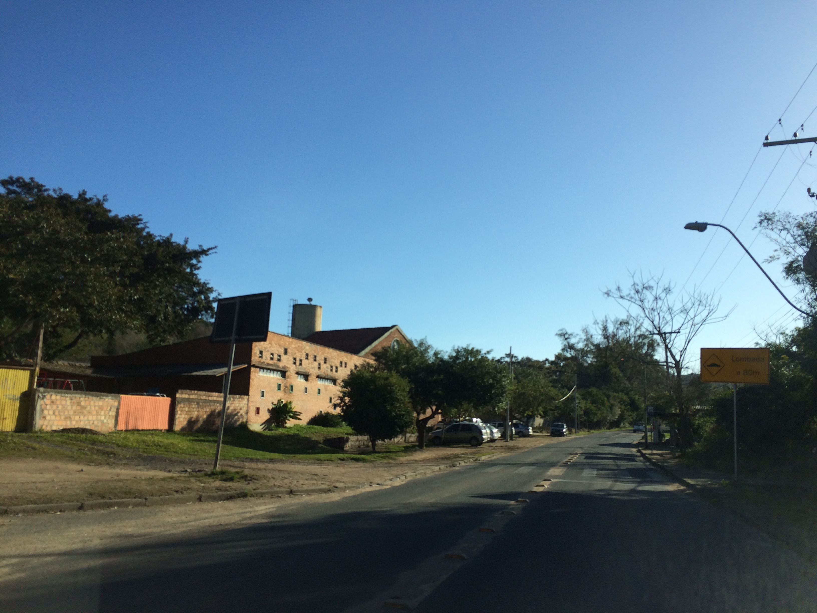 Vista da Escola Estadual de Ensino Fundamental Dr. José Loureiro da Silva, no Bairro Ponta Grossa, em Porto Alegre.